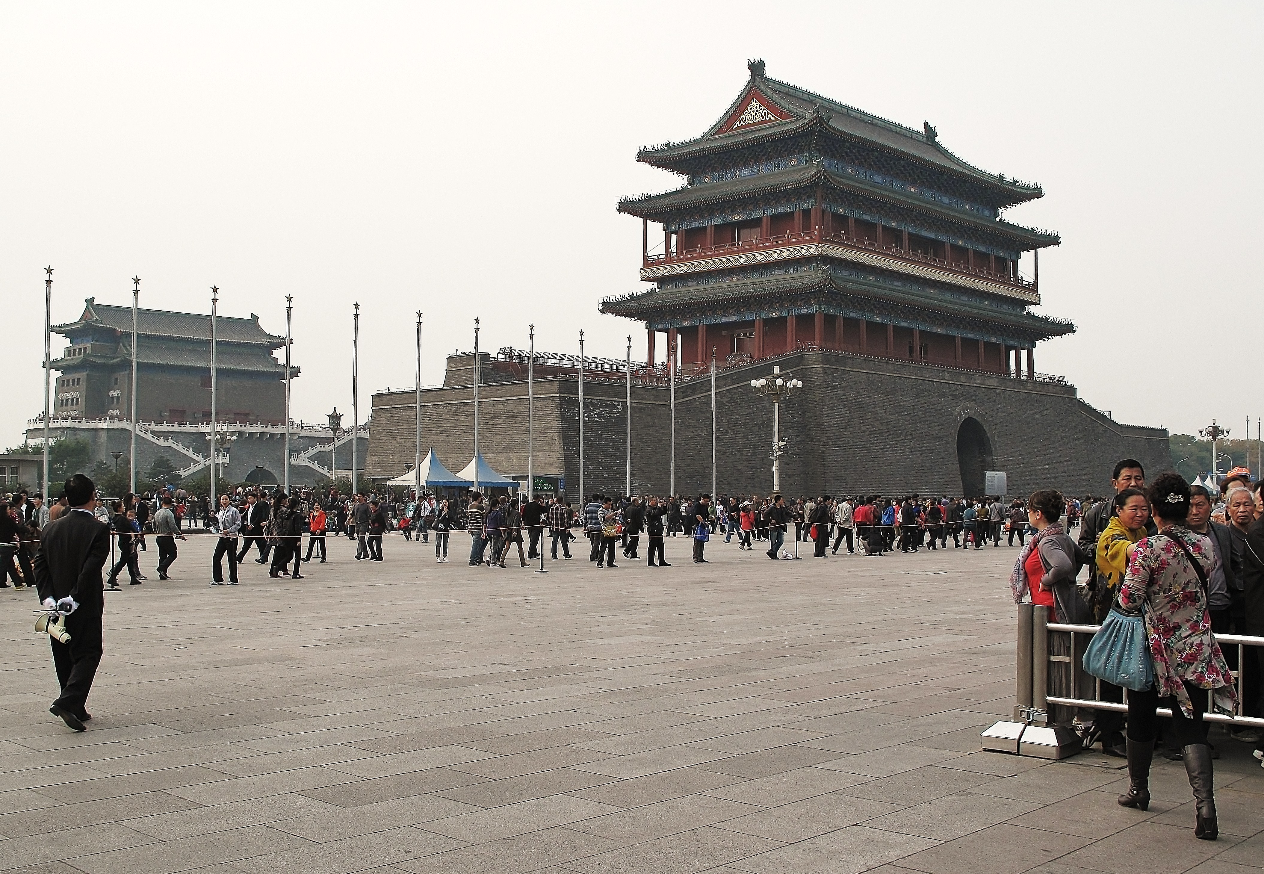 Beijing Gates